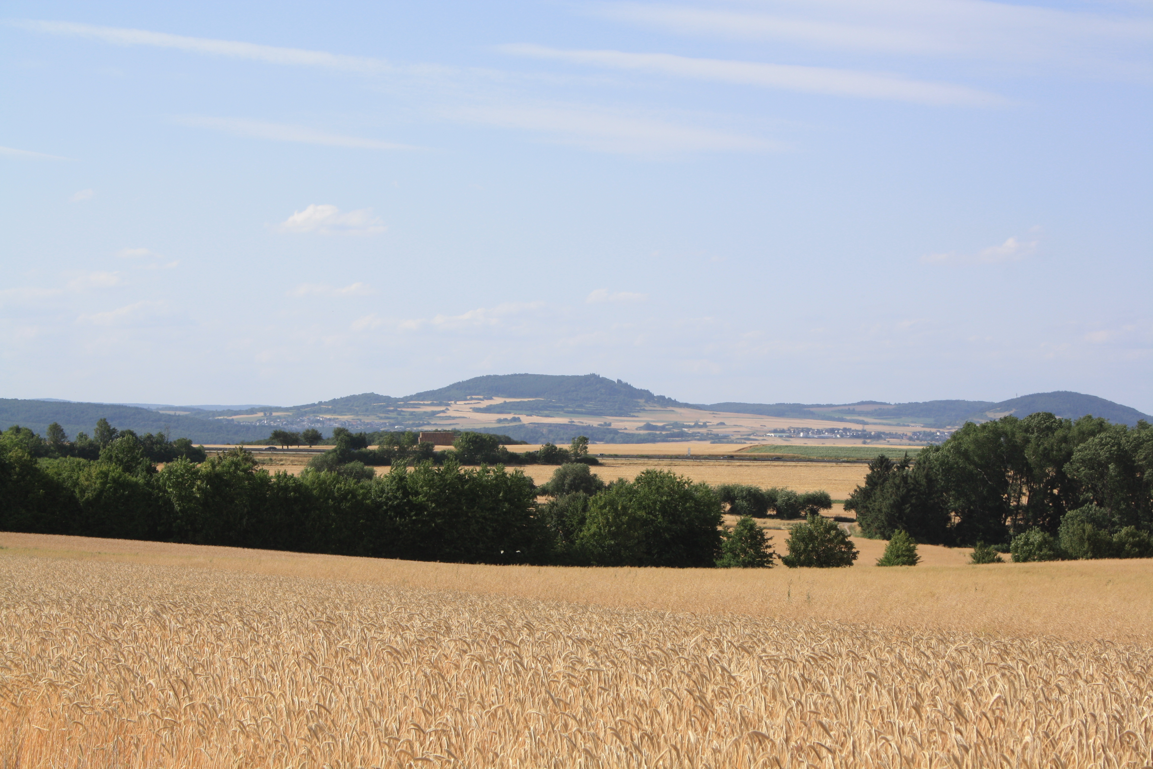 Der Hochsimmer